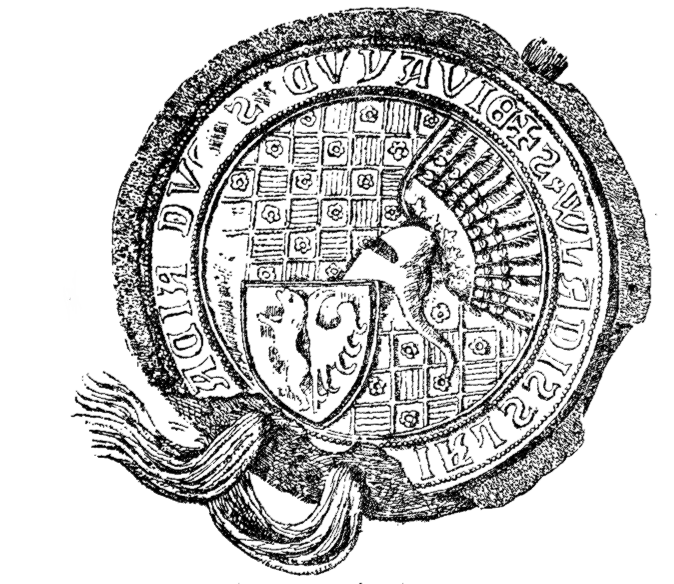 Władysław Biały seal 1355